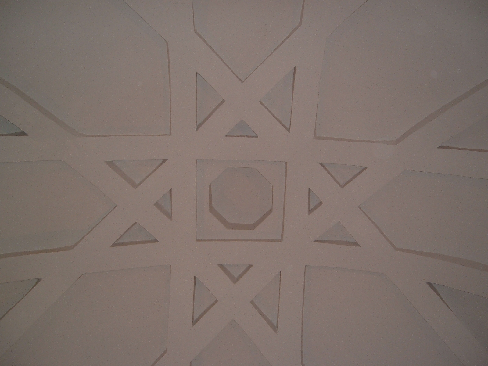 Cúpula del castell de la Talaia, primer pis.